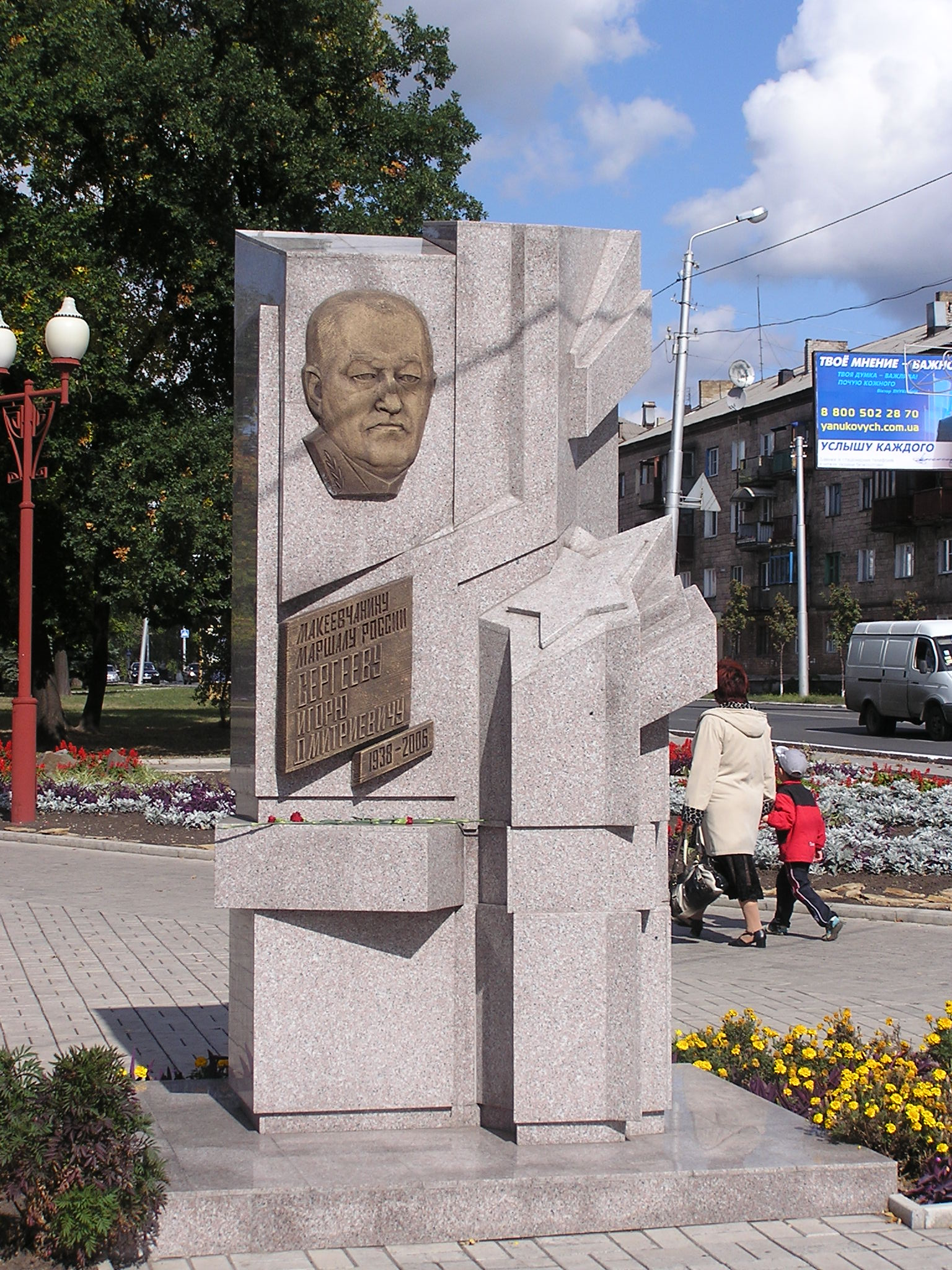 Макеевка